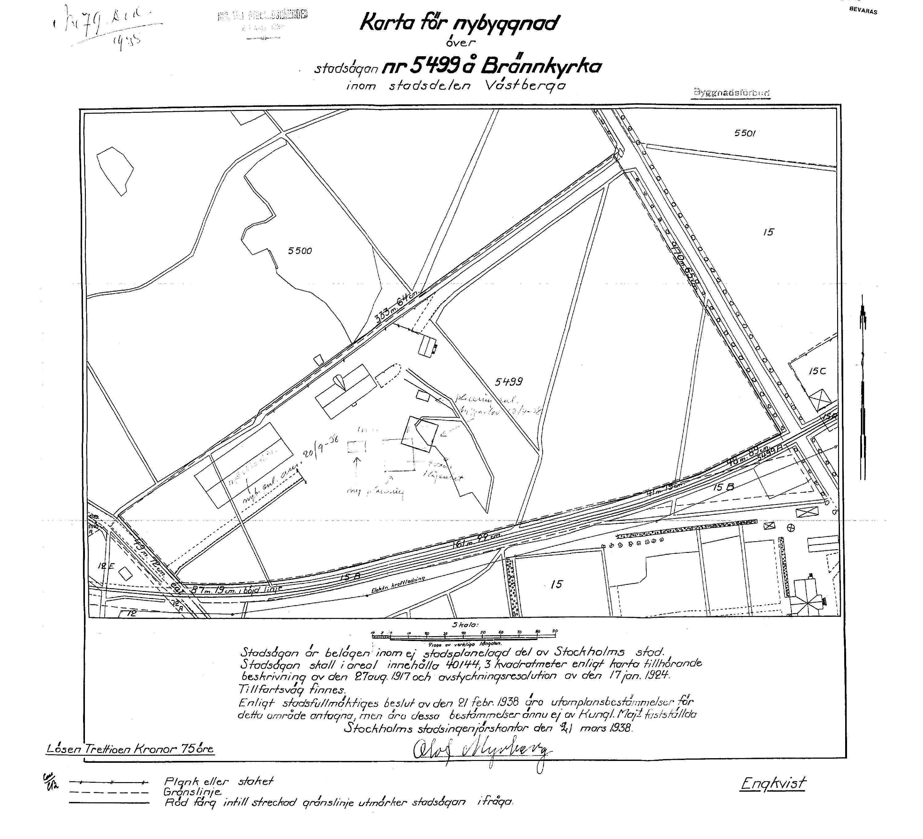 Tomtkarta för Villa Engkvist